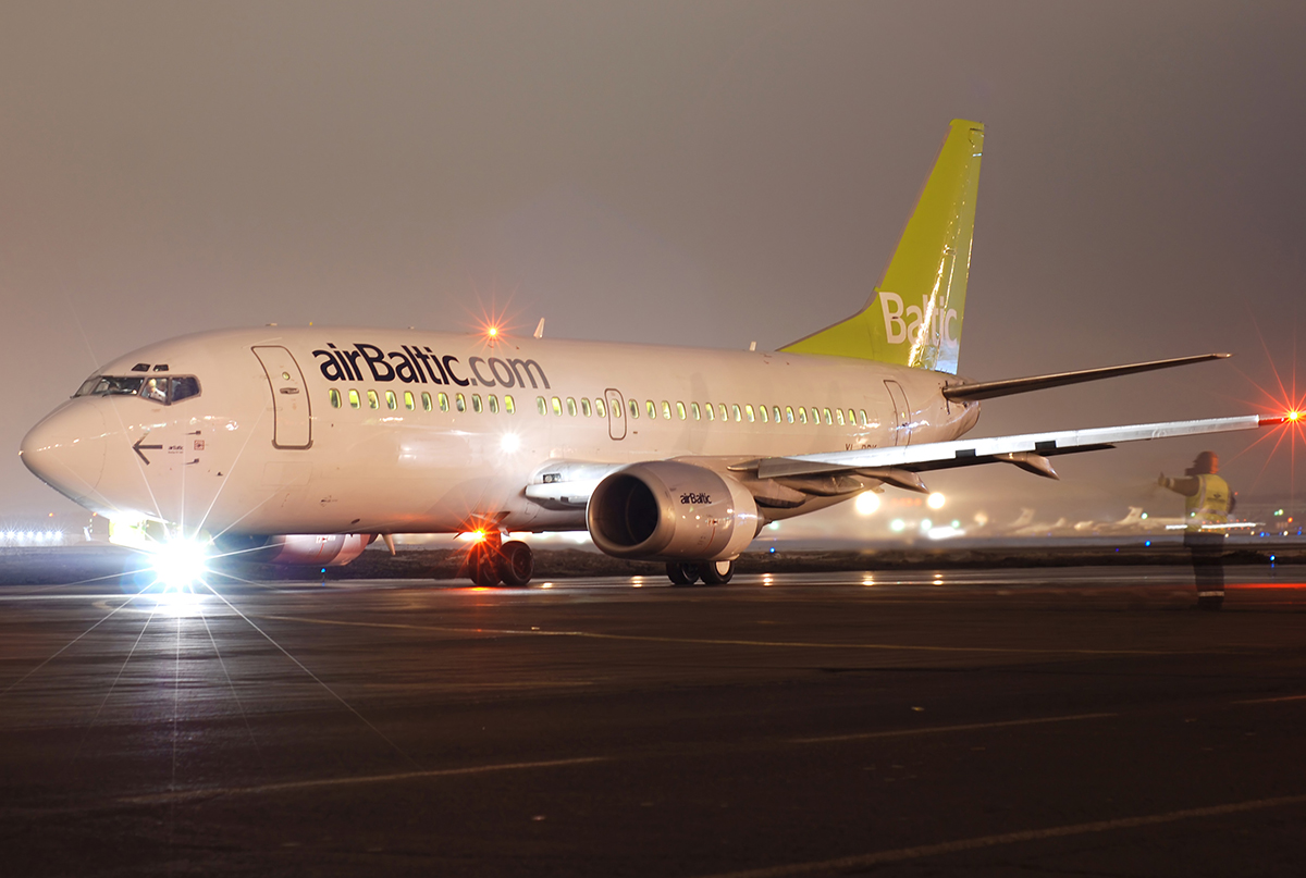 "Air Baltik" B-737 YL-BBK